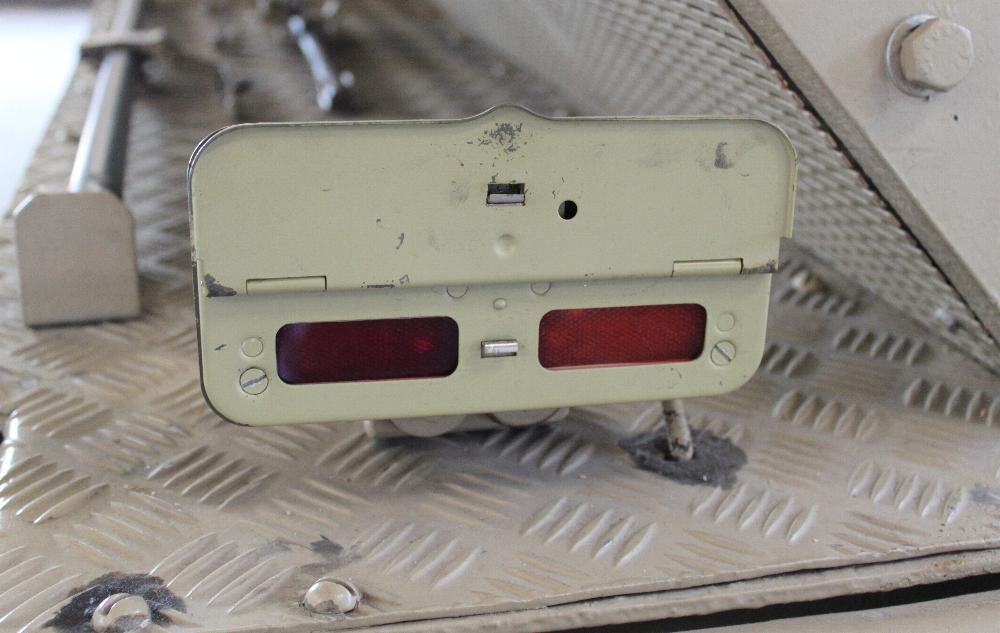 Notek Abstandsrücklicht. Bild zeigt Normalbetrieb. Verbaut an allen Wehrmachtsfahrzeugen